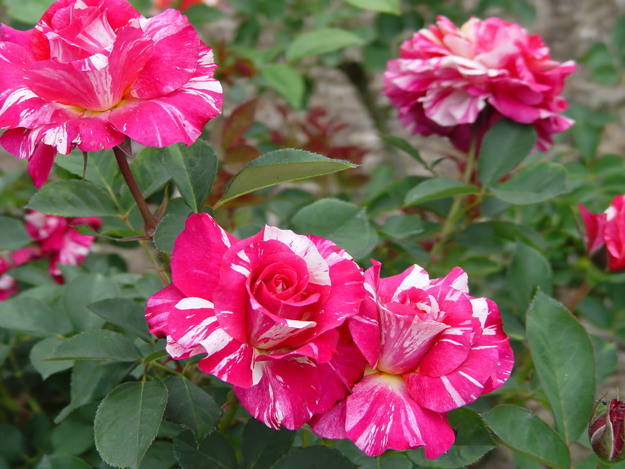 Floribunda フロリバンダ Henri Matisse アンリ マチス France フランス Delbard 1996